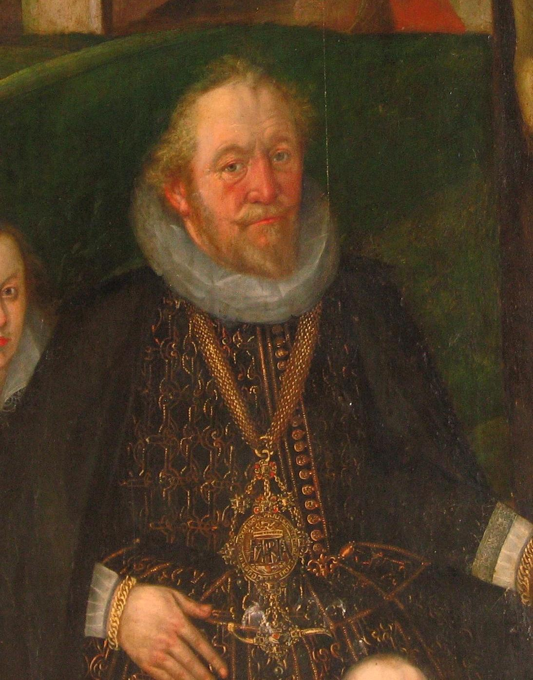 Detail des Bildnises Franz' II. von Sachsen-Lauenburg mit seiner Familie in der Marienkirche von Büchen. Das Foto zeigt die Darstellung Franz' II.